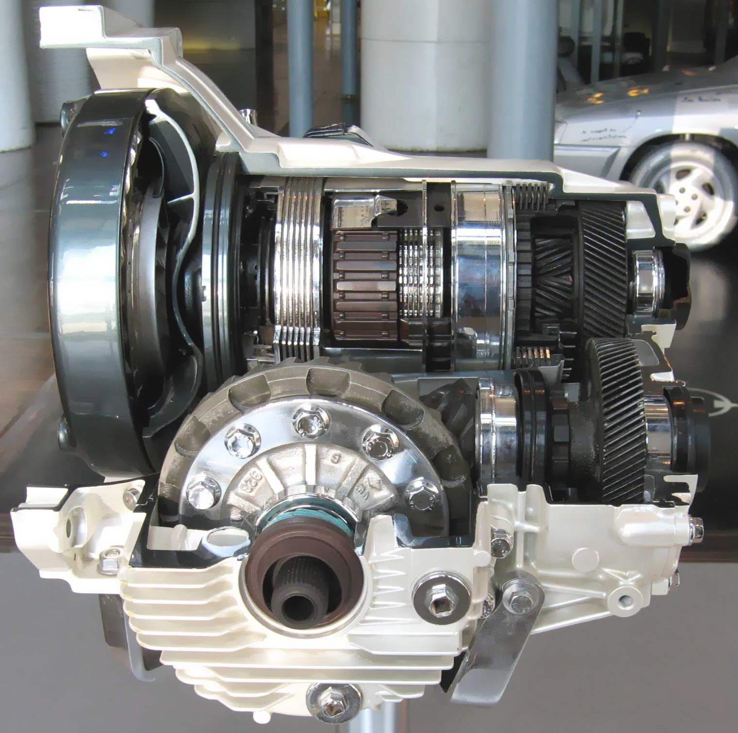 Ecorché de boite de vitesses automatique de Renault. Musée des sciences et des techniques de la Villette, Paris, France.